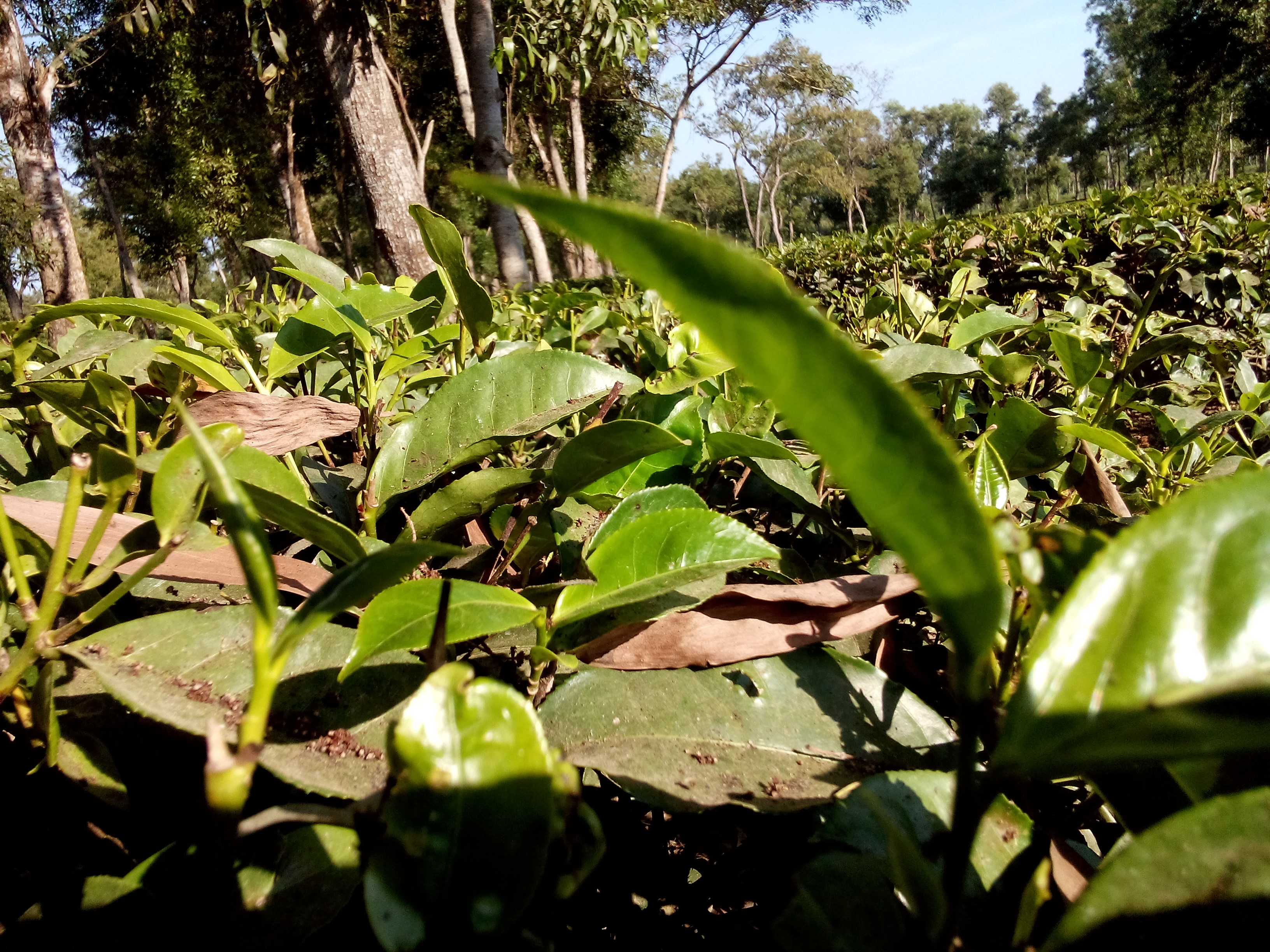 লাউয়াছড়া জাতীয় উদ্যান